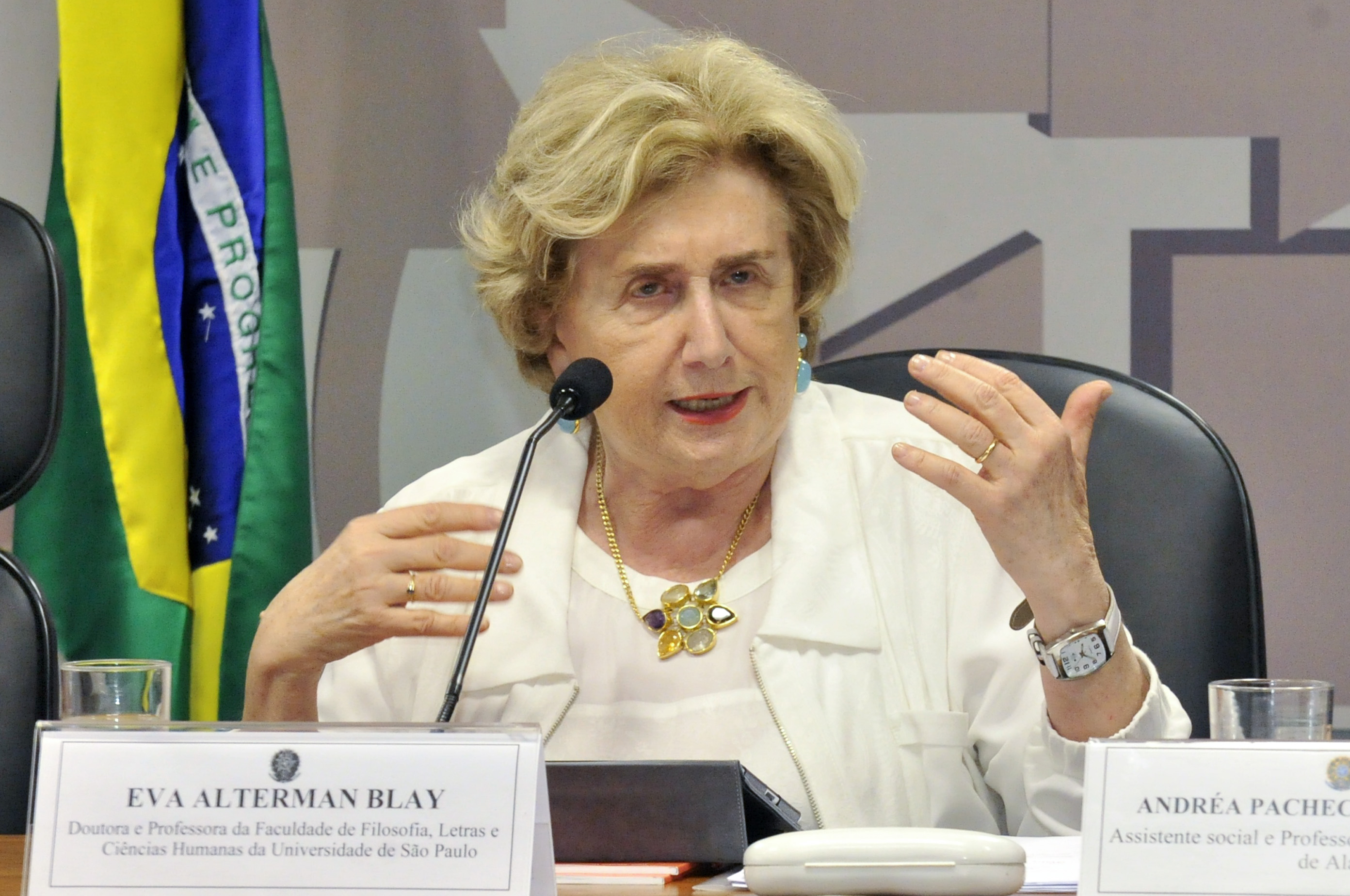 A Comissão Permanente Mista de Combate à Violência contra a Mulher (CMCVM) realiza audiência pública interativa da Comissão de Combate à Violência Contra Mulher (CMCVM) para discutir a violência sexual contra mulheres nas universidades brasileiras. Em pronunciamento, professora da Faculdade de Filosofia, Letras e Ciências Humanas da Universidade de São Paulo, Eva Alterman Blay. Foto: Waldemir Barreto/Agência Senado